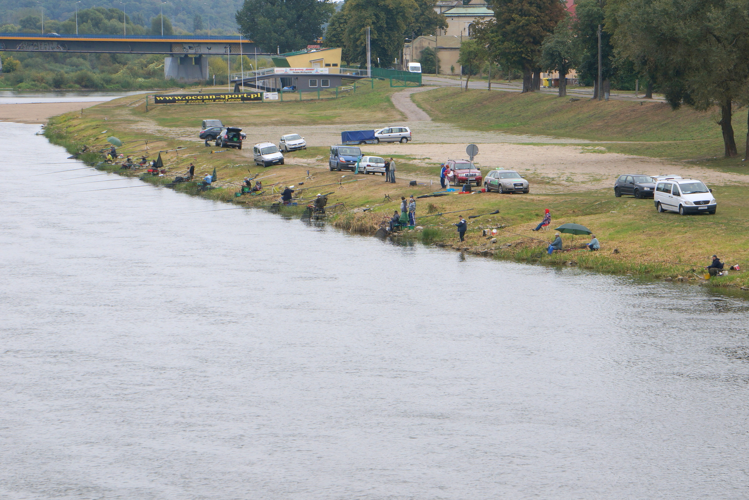 Gorzów Wlkp. Wędkarze nad Wartą